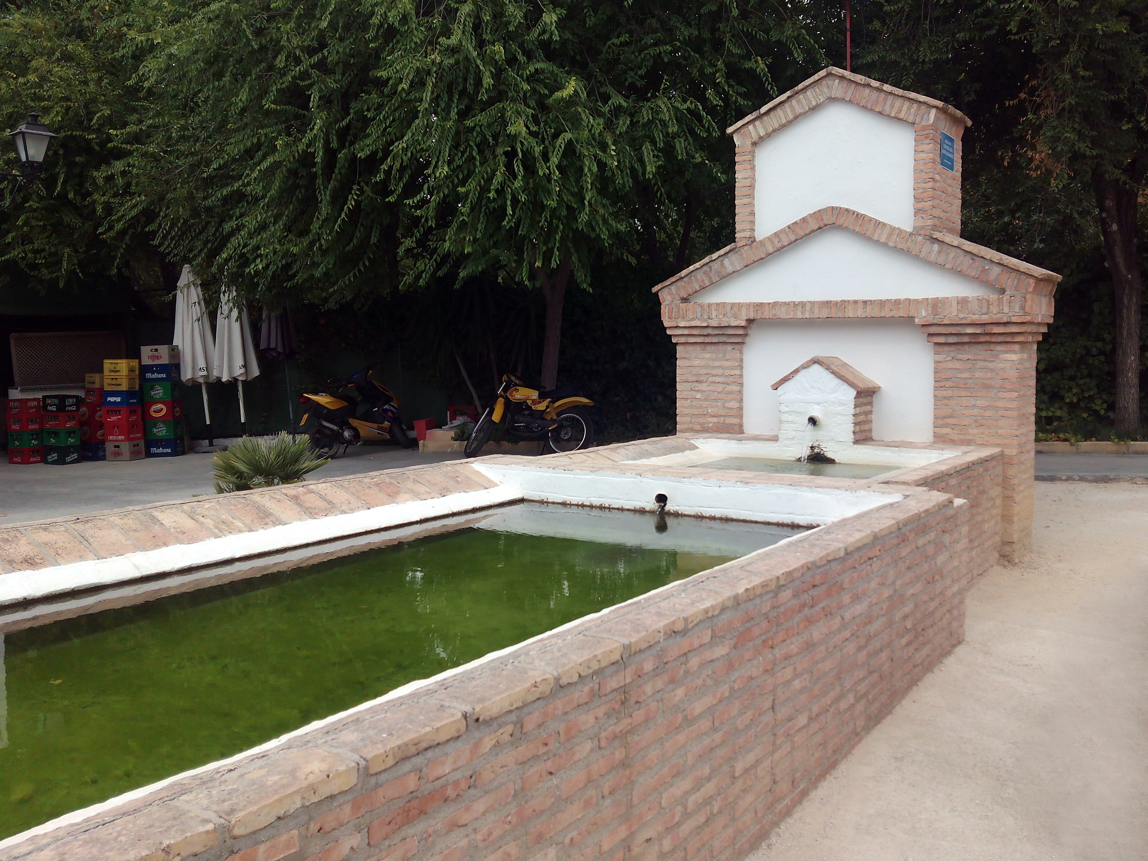 Fuente de la Piscina, Montalbán de Córdoba (España).